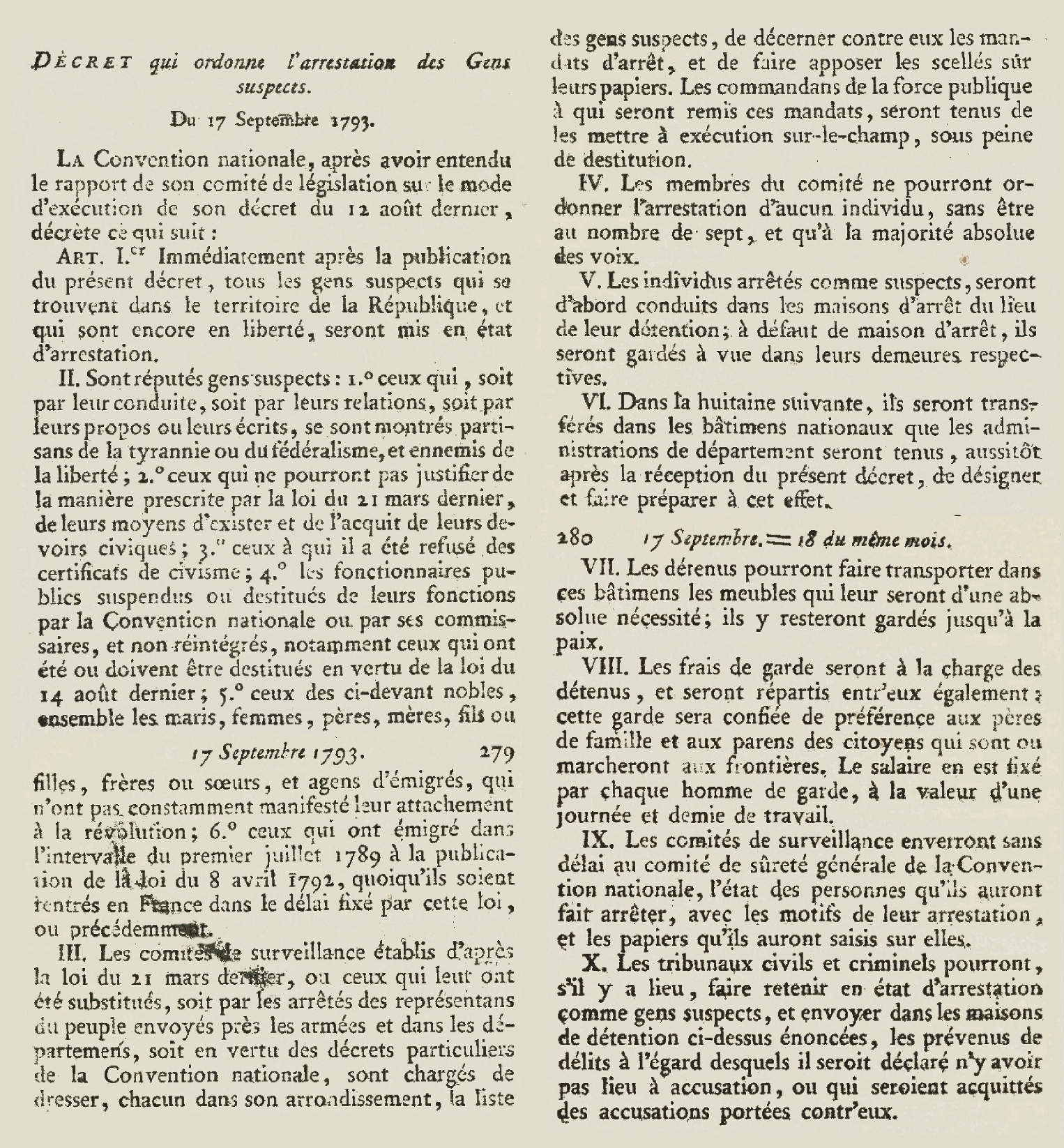 Transcription du décret du 17 septembre 1793 relatif aux gens suspect dans Rondonneau, Louis (1759-1834).- Code militaire, ou Recueil méthodique des décrets relatifs aux troupes de ligne et à la gendarmerie nationale rendus par les Assemblées constituante et législative et par la Convention nationale, depuis 1789, jusques et compris le 15 juin 1793, Tome 4, 1793, p.278.